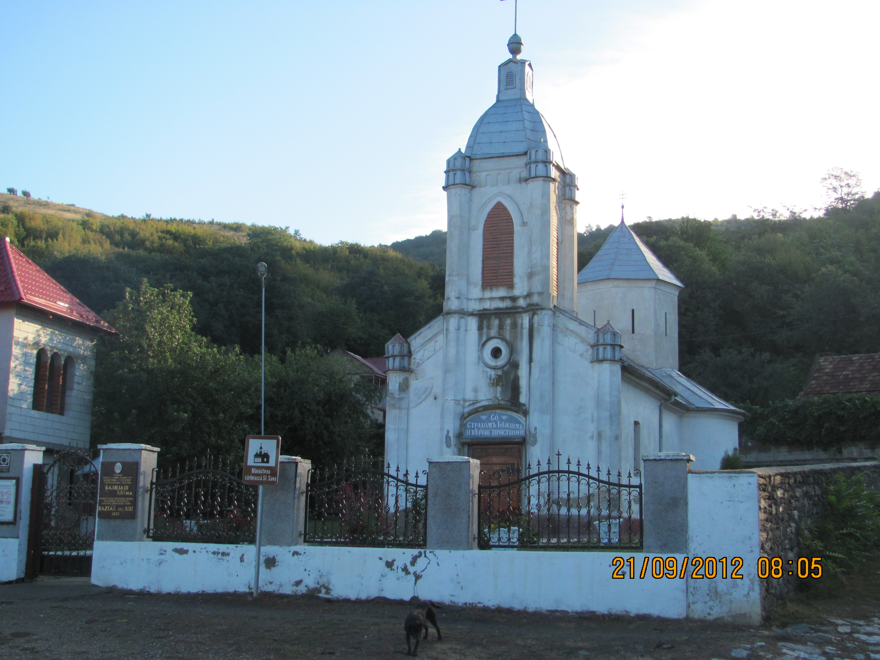 Manastirea sarbeasca "Sfantul Sava" - sat Bazias,com.Socol, jud.Caras-Severin - cod LMI - CS-II-a-A-10972